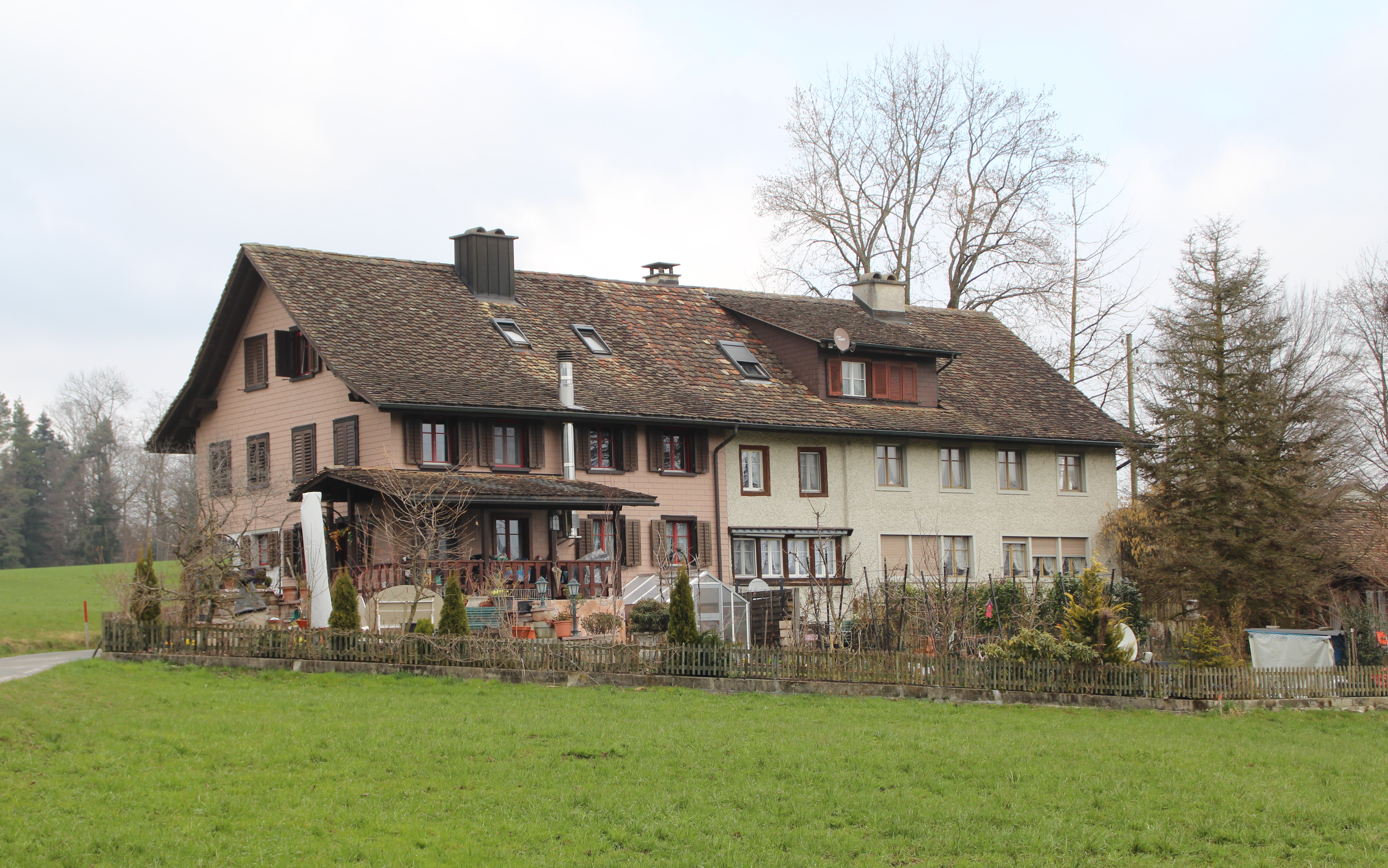 Flarz bei Esslingen im Kanton Zürich